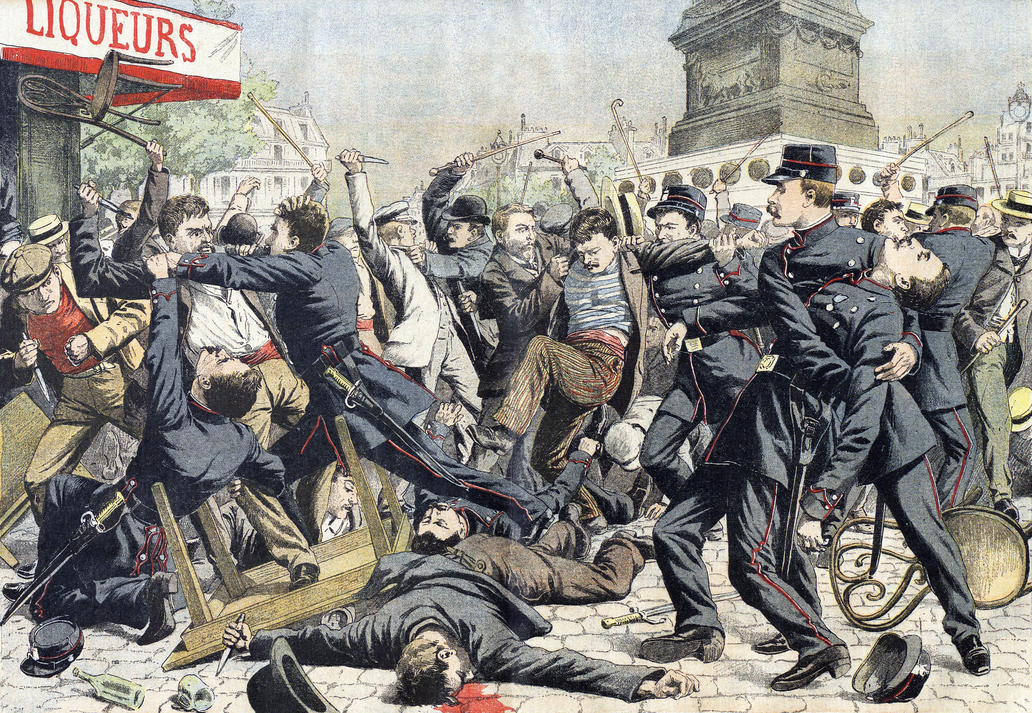 « Encore les rôdeurs ! Rencontre d'Apaches et d'agents de police sur la place de la Bastille. » Supplément illustré du Petit Journal, 14 août 1904.